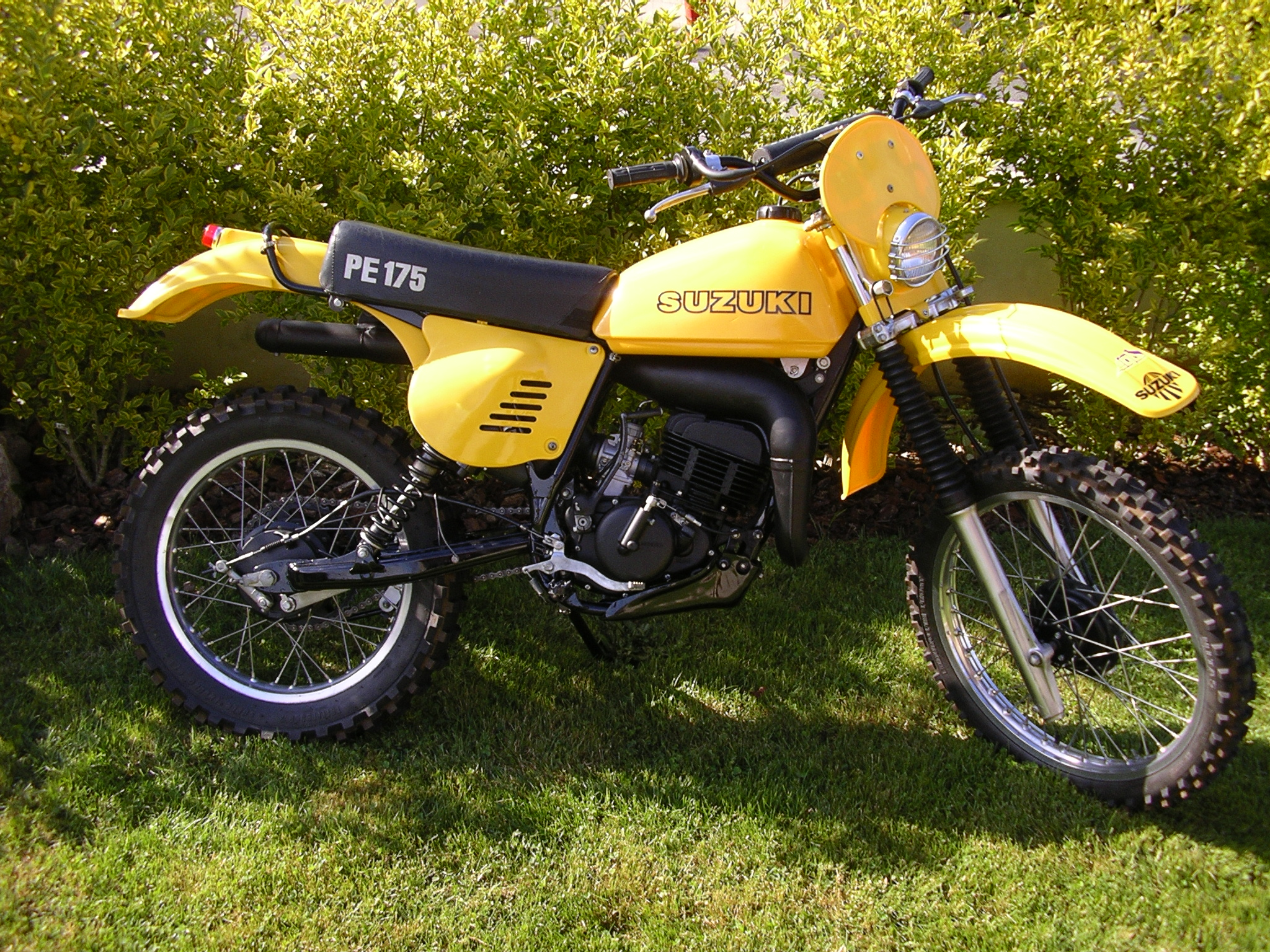 photo de ma suzuki pe 175 c